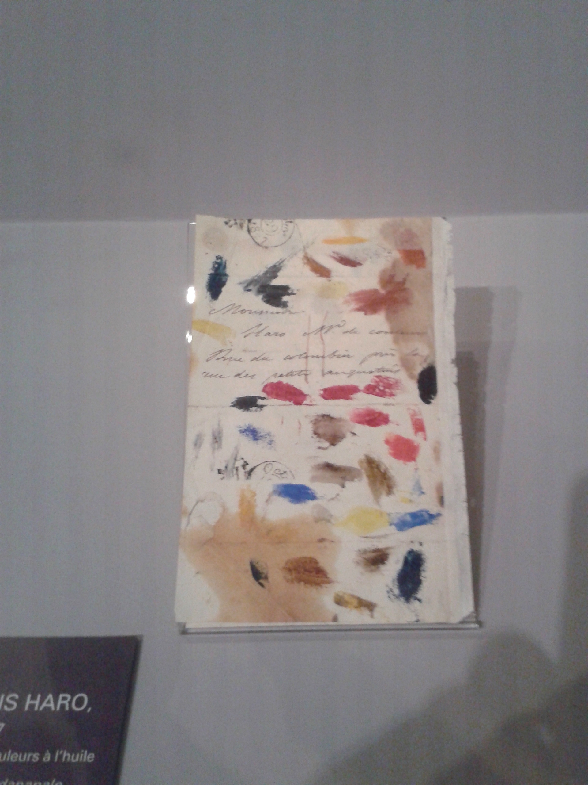 Lettre de commande de Couleurs de Delacroix - présentée à l'exposition Delacroix 2018.